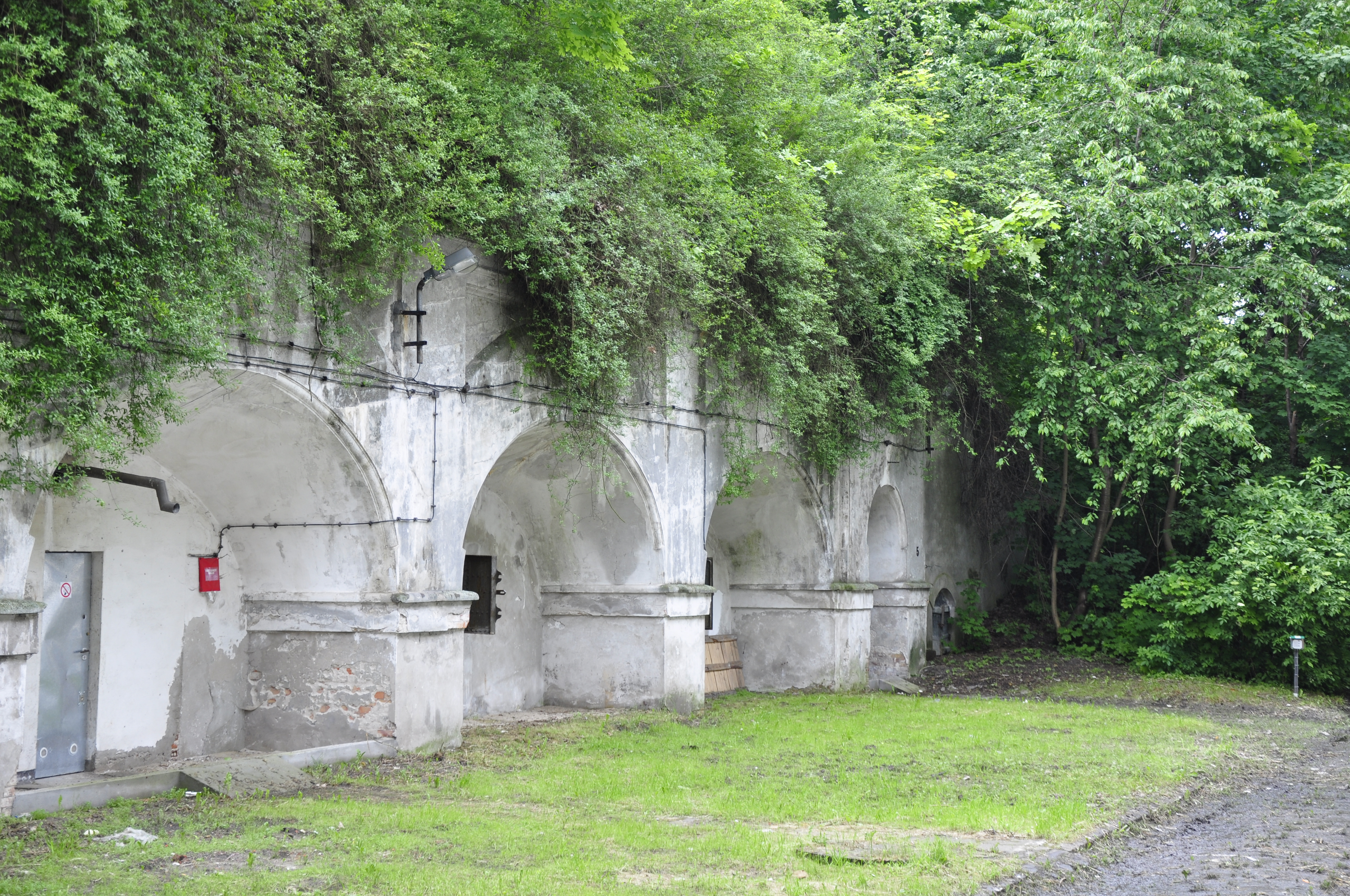 Warschau, Fort VIIA